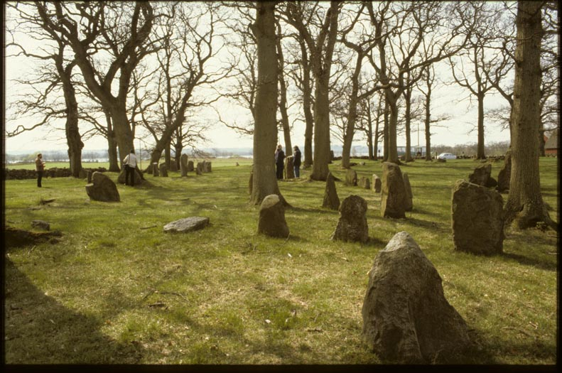 Fulltofta 2:1. Gravfält, 95x60 m (N-S), bestående av ca 58 fornlämningar. Dessa utgörs av 2 domarringar, 6 skeppsättningar, ca 35 resta stenar och ca 15 klumpstenar. Motiv: Fulltofta 2:1 Kategori: Gravfält Fulltofta 2:1. Gravfält, 95x60 m (N-S), bestående av ca 58 fornlämningar. Dessa utgörs av 2 domarringar, 6 skeppsättningar, ca 35 resta stenar och ca 15 klumpstenar.